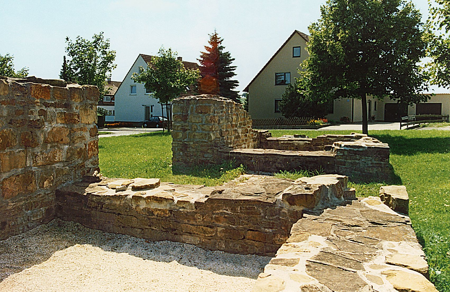 Kastell Unterböbingen, Porta decumana, Obergermanisch-Raetischer Limes